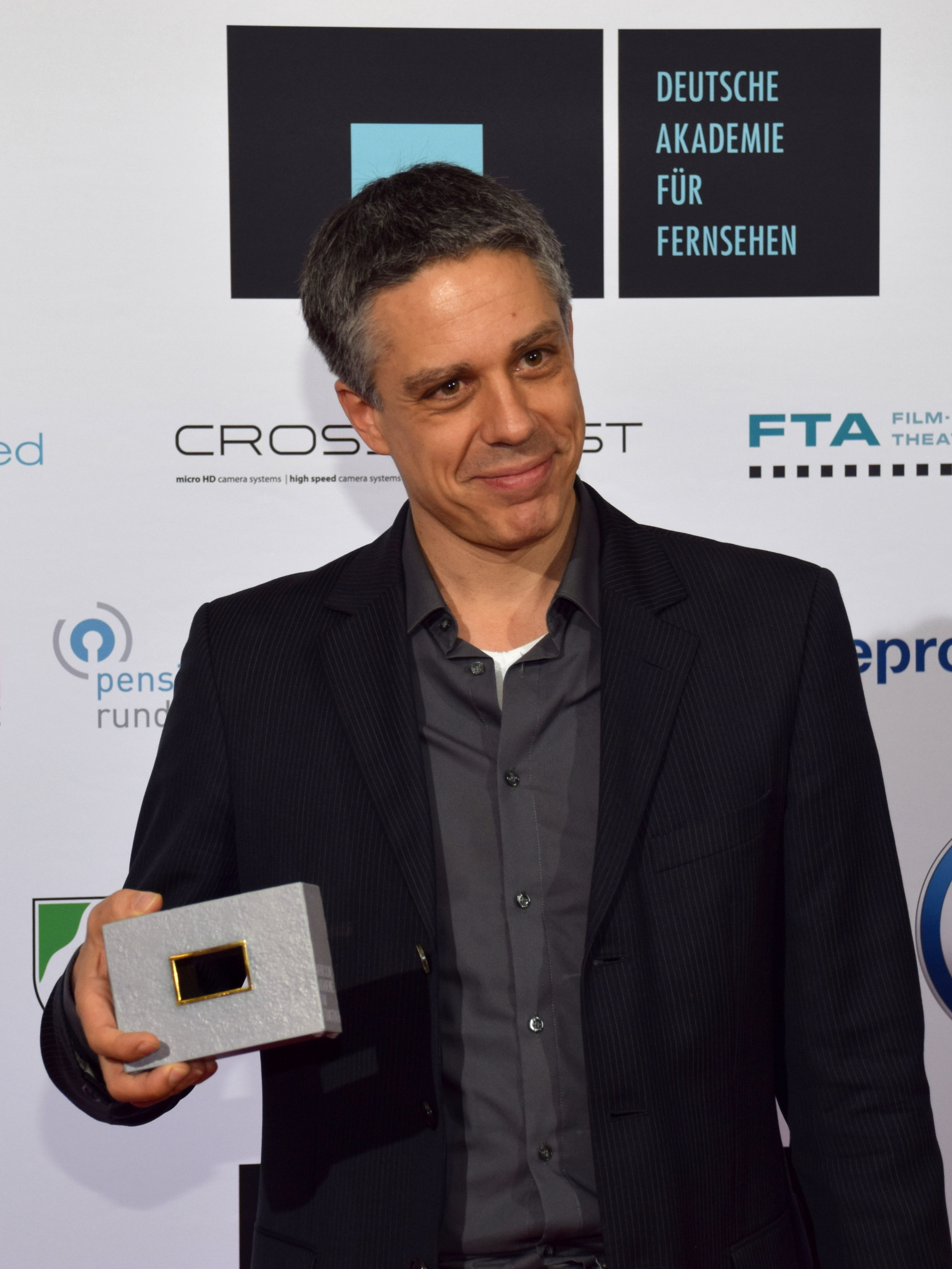 Fabian Römer (Komponist) Deutsche Akademie für Fernsehen - Symposium und Preisverleihung 2015 in Köln